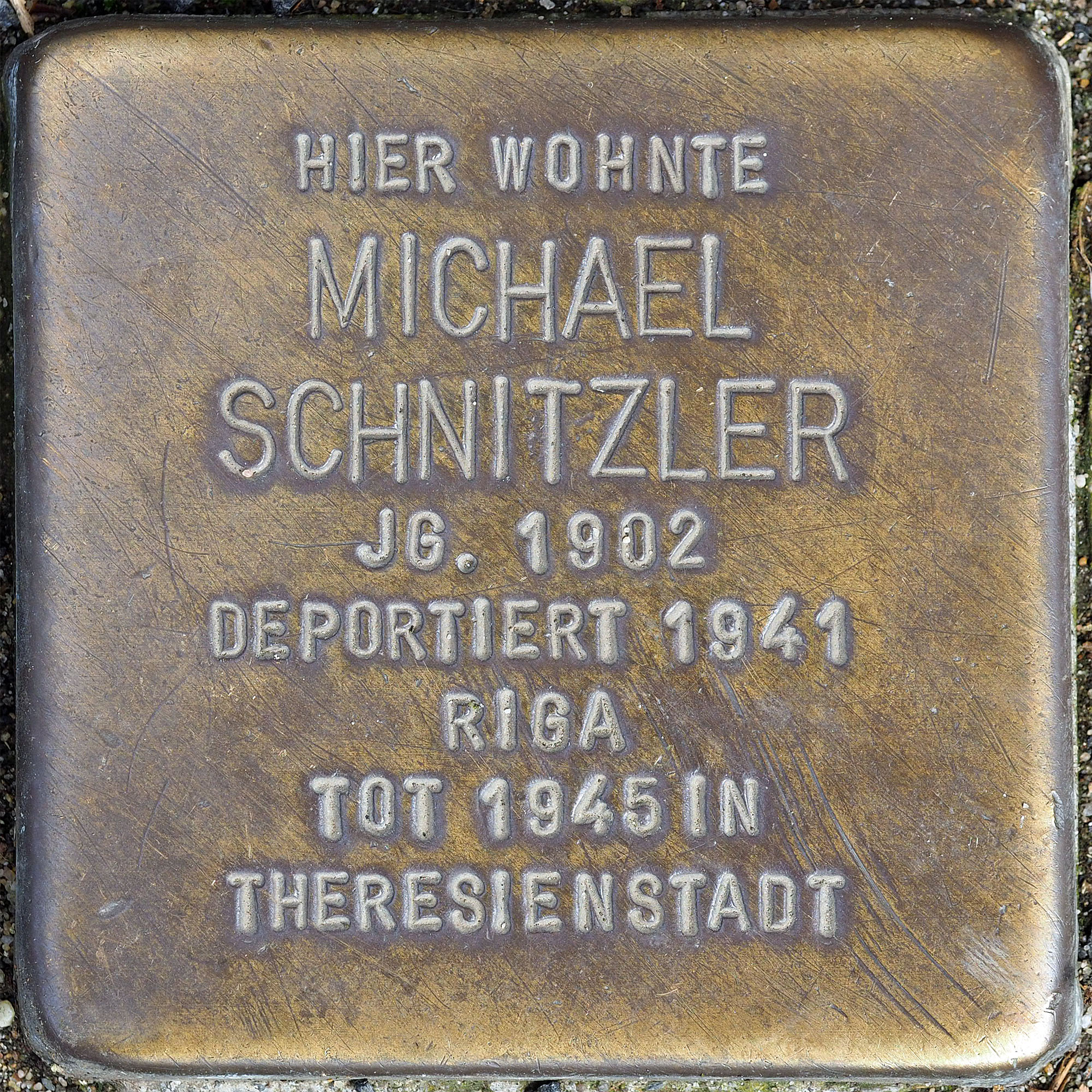 Stolpersteine MG: Schnitzler, Michael